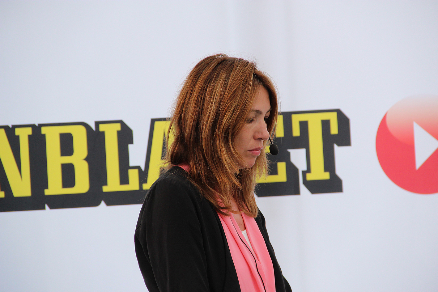 Journalisten Karin Magnusson under Almedalsveckan 2013.